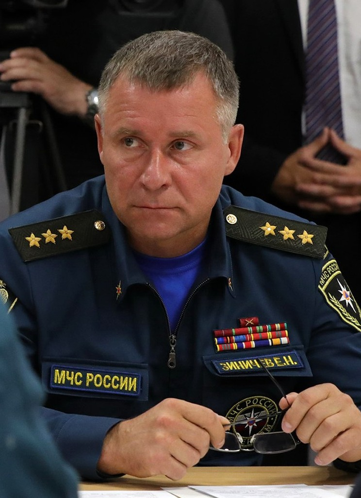 На совещании по ситуации с наводнениями в ряде районов Иркутской области.